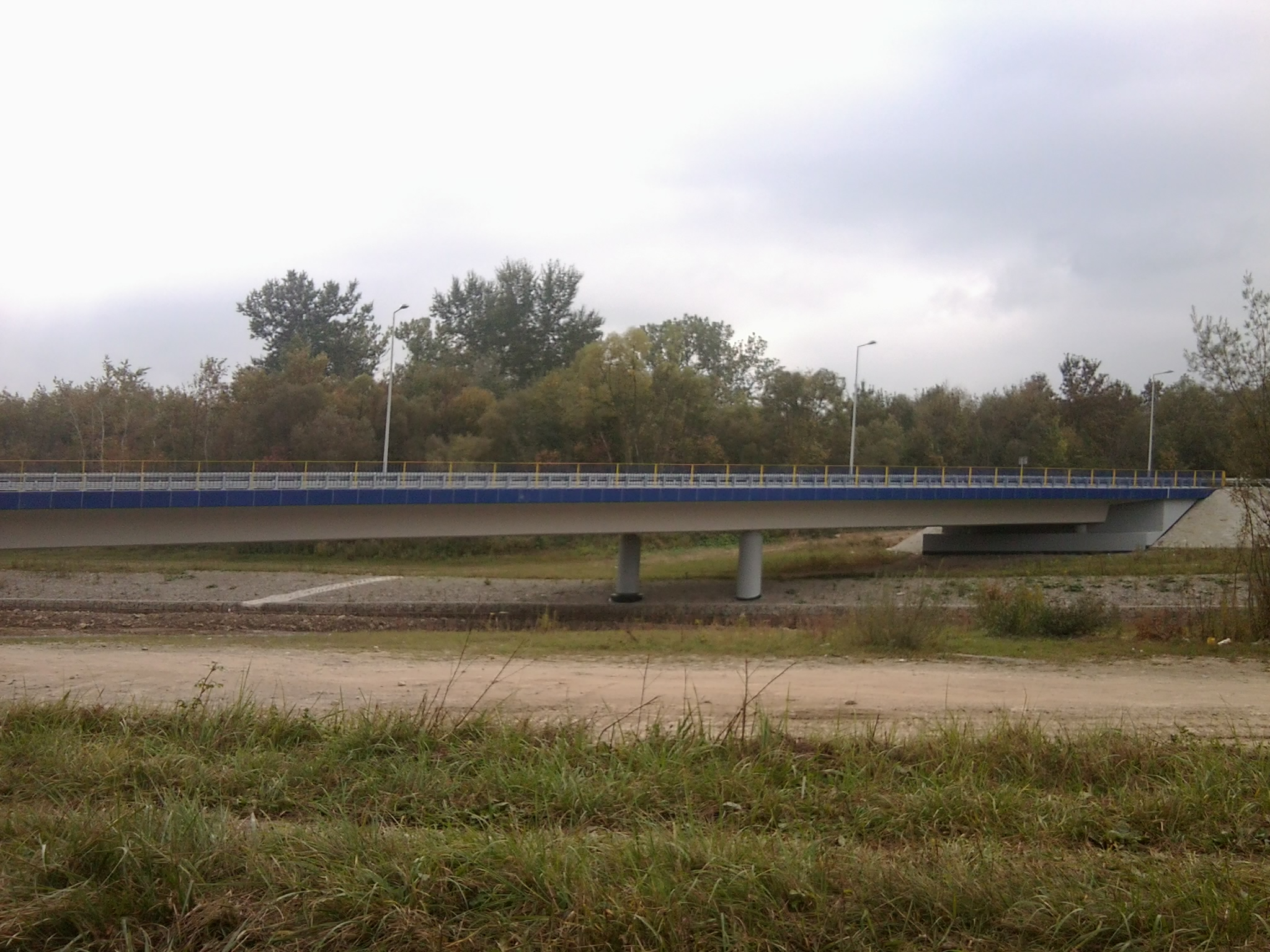 Most na Słomce w ciągu obwodnicy Podegrodzia.